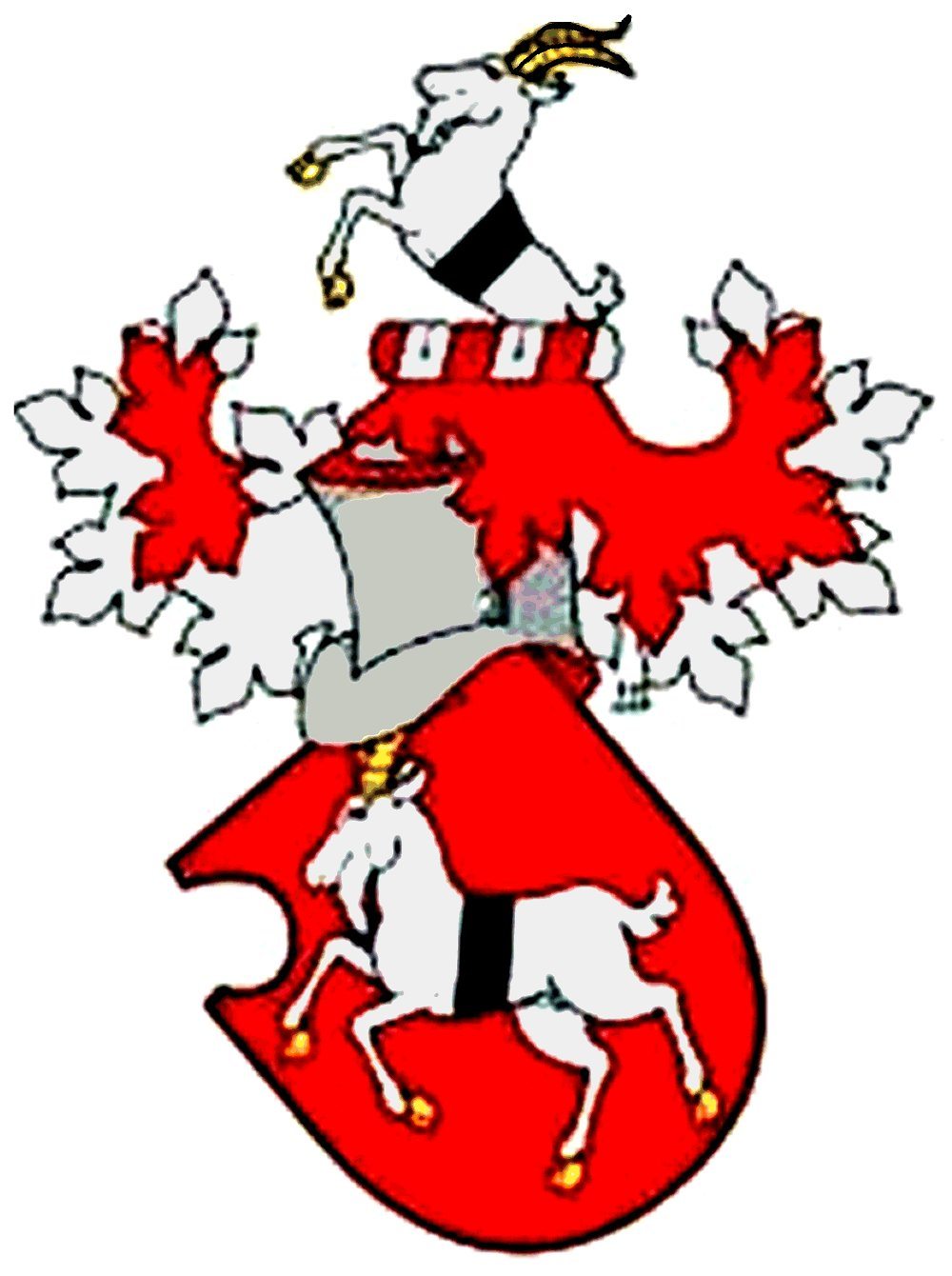 Erb rodu Vlčků (Wilczeků) z Dobré Zemice